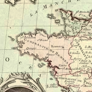 Partie bretonne de la carte intitulée "La France divisée en ses généralités ou intendances et pays d'Etats avec les chefs-lieux des élections, bailliages, territoires, prévôtés, subdélégations etc. Pour être insérée dans la lettre du roi pour la convocation des Etats généraux, du 24 janvier 1789." Gravure rehaussée de couleurs. Hors carte, à droite, liste des villes administratives des zones frontières du Nord et de l'Est, et à gauche, portrait anonyme du ministre Necker en médaillon, souligné de quatre vers de P.-L. Moline. "A Paris, chez Desnos, ingénieur géographe du roi, rue Saint-Jacques, au Globe"